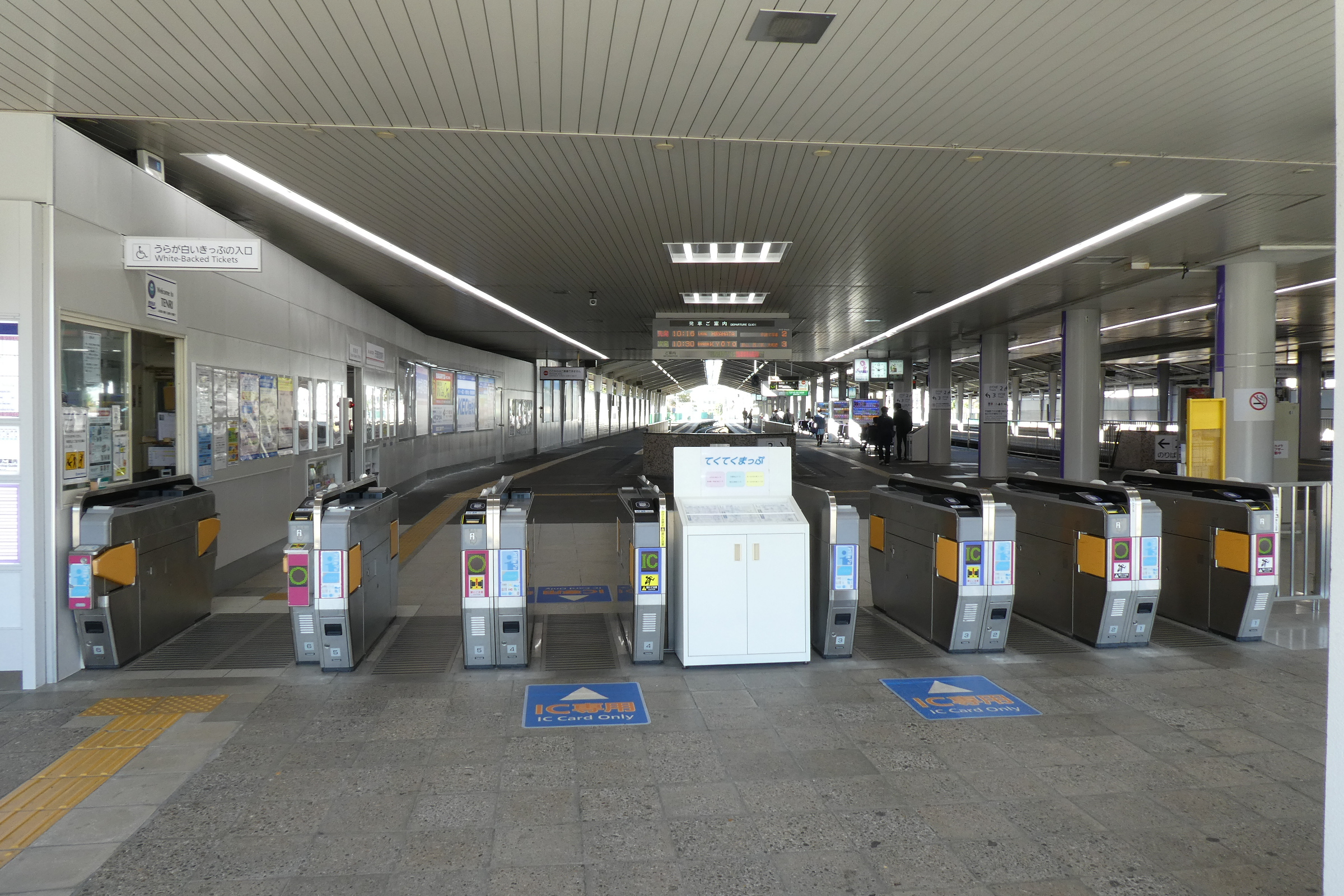 近鉄天理駅改札。